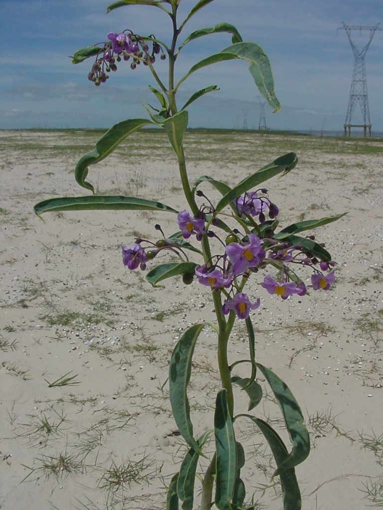 Solanum glaucophyllum - SOLANACEAE - Lagoa Mirim - Taim - RS - Brasil